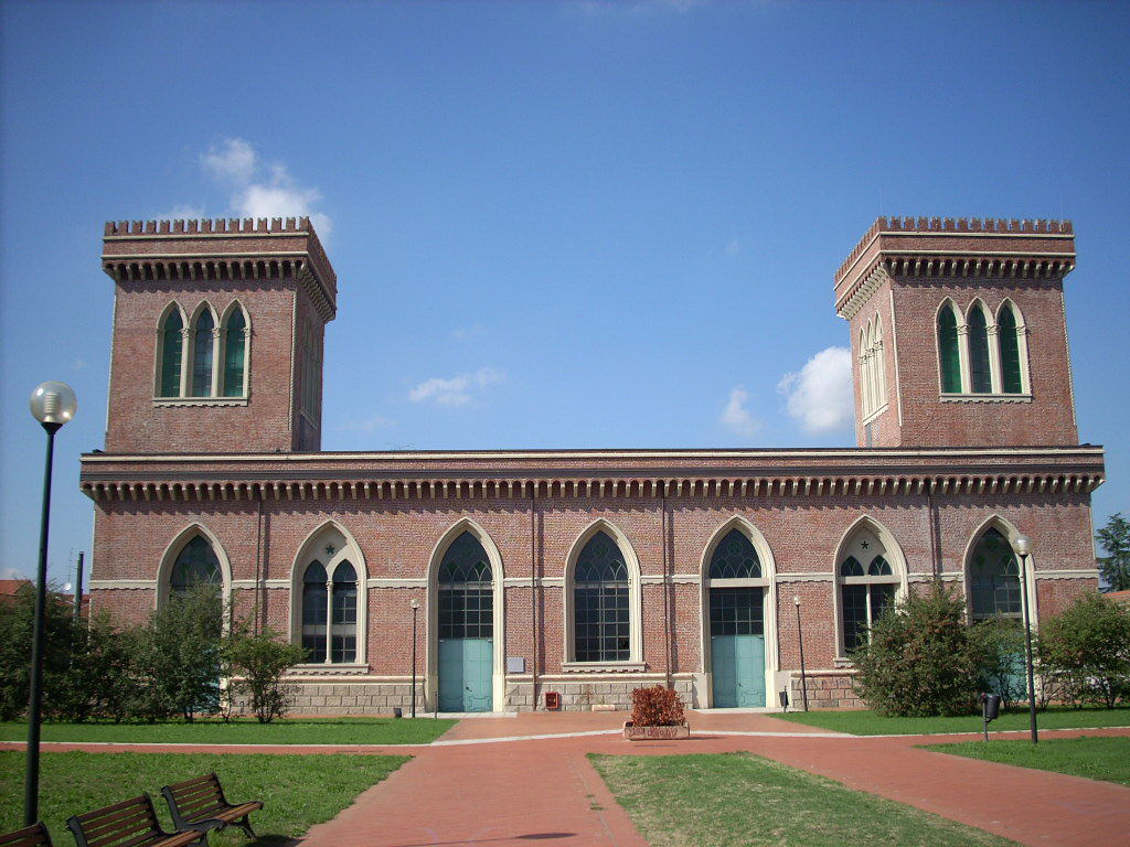 Museum of Textiles and Industry of Busto Arsizio Native nameMuseo del tessile e della tradizione industriale di Busto ArsizioLocationBusto ArsizioCoordinates45° 36′ 53.52″ N, 8° 50′ 48.73″ E Established30 October 1997 Web page control : Q3867987 OSM: 96255563 institution QS:P195,Q3867987